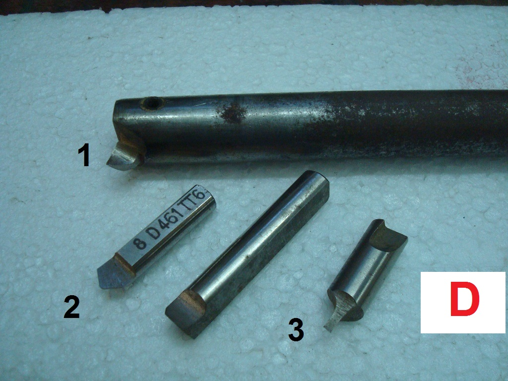 Outil porte-grain et grains